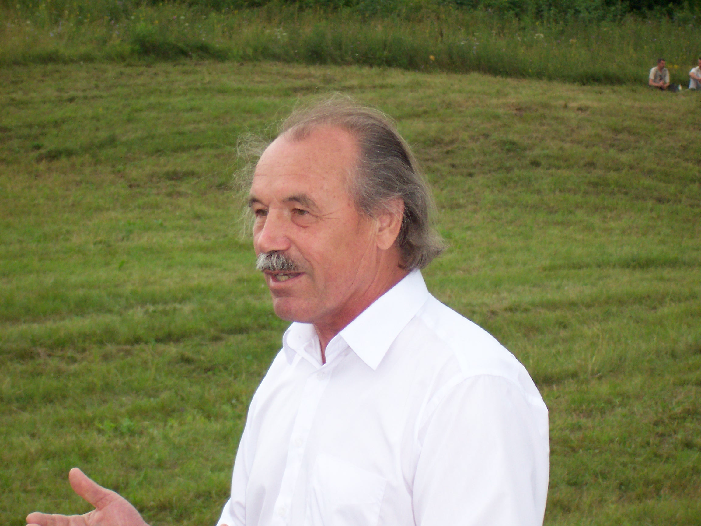 "Эрзянь "Масторава" морокерьксенть сёрмадеезе Шарононь Сандра", "The author erzian the eposs "Mastorava" Sharononj Sandra"